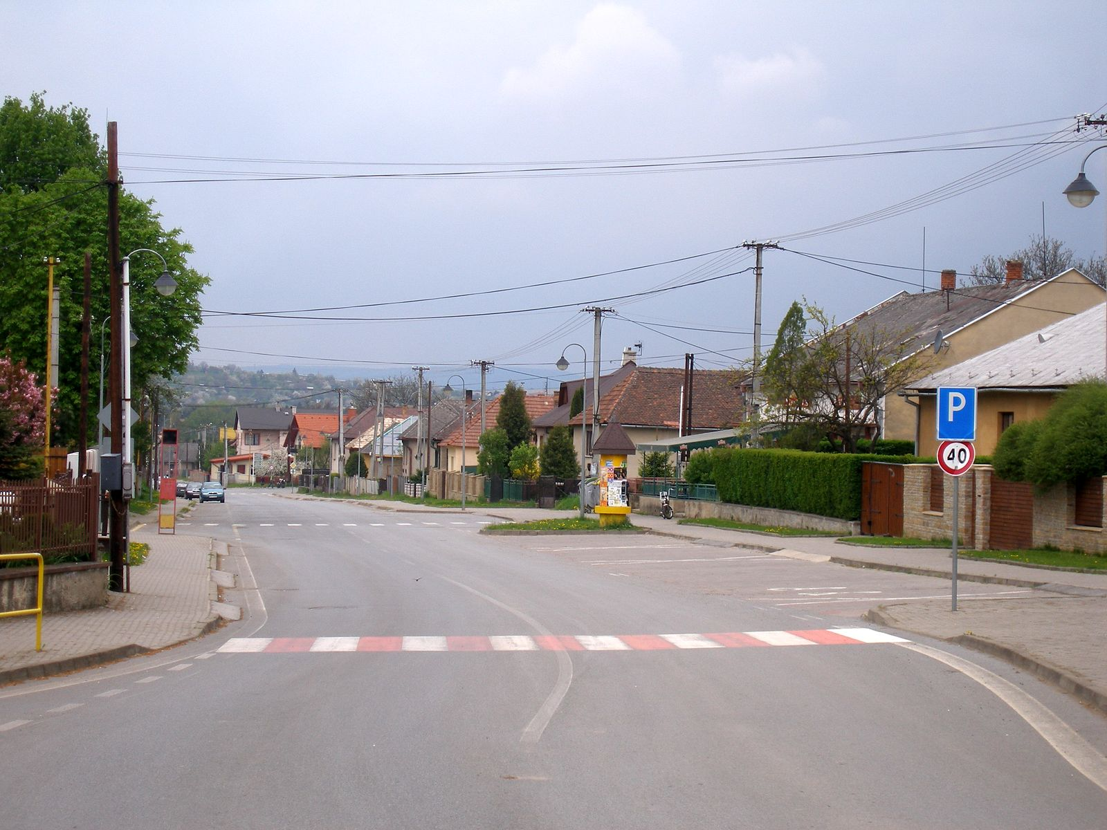 Obec Ľubotice okres Prešov región Šariš